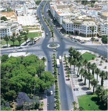 Le centre de la ville de settat.